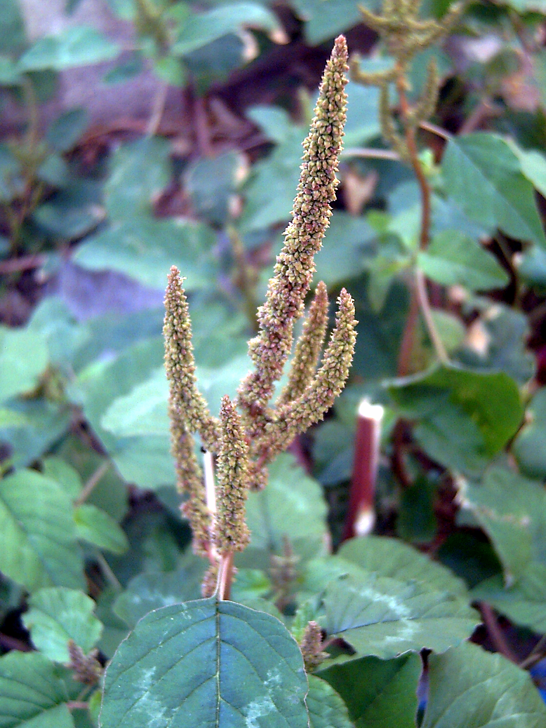 Amaranthus viridis inflorescence close up, Torrelamata street, Torrelamata, Torrevieja, Alicante, Spain